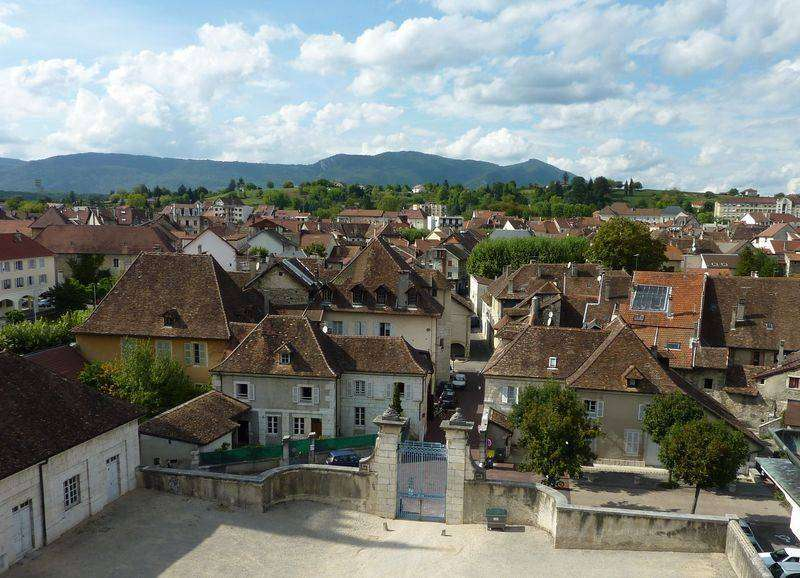 Vue sur les toits typiques de la ville. Photo prise depuis le palais épiscopal.